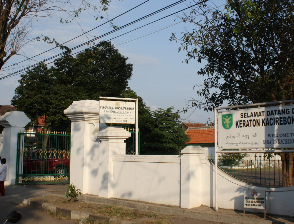 Keraton Kacirebonan Jalan Pulasaren, Kota Cirebon - Jawa Barat